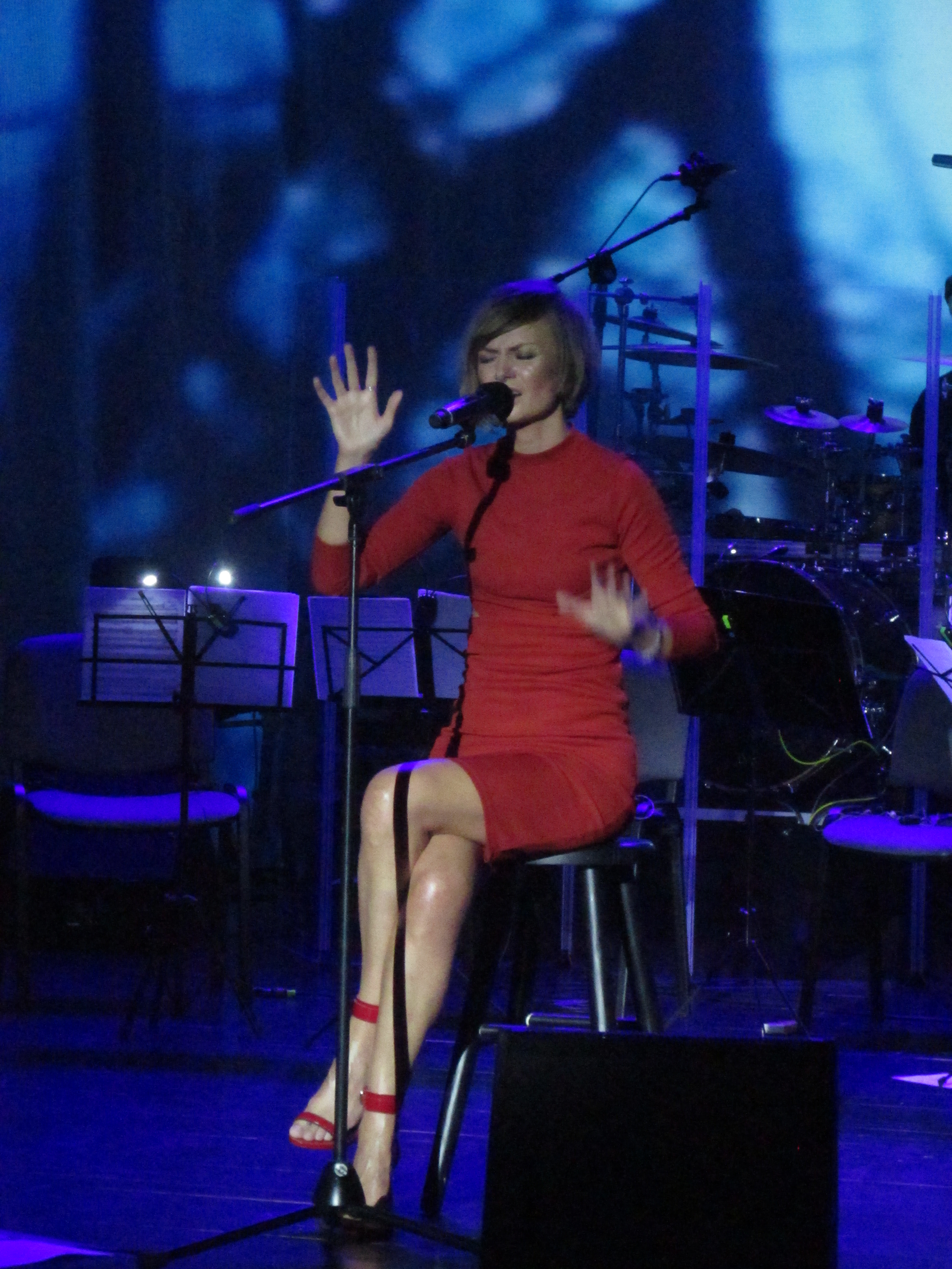 Kasia Stankiewicz podczas koncertu z zespołem Varius Manx